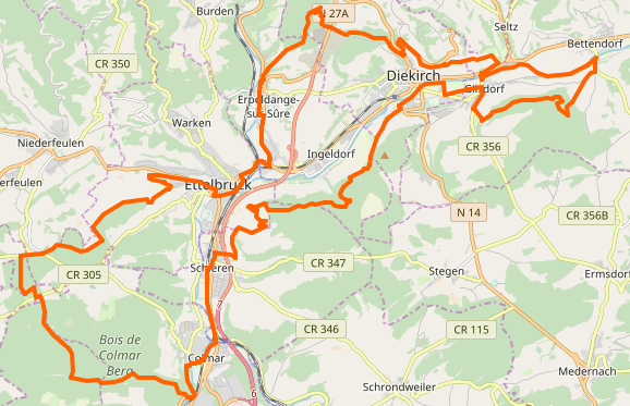 Streck vum Adrien-Ries-Pad